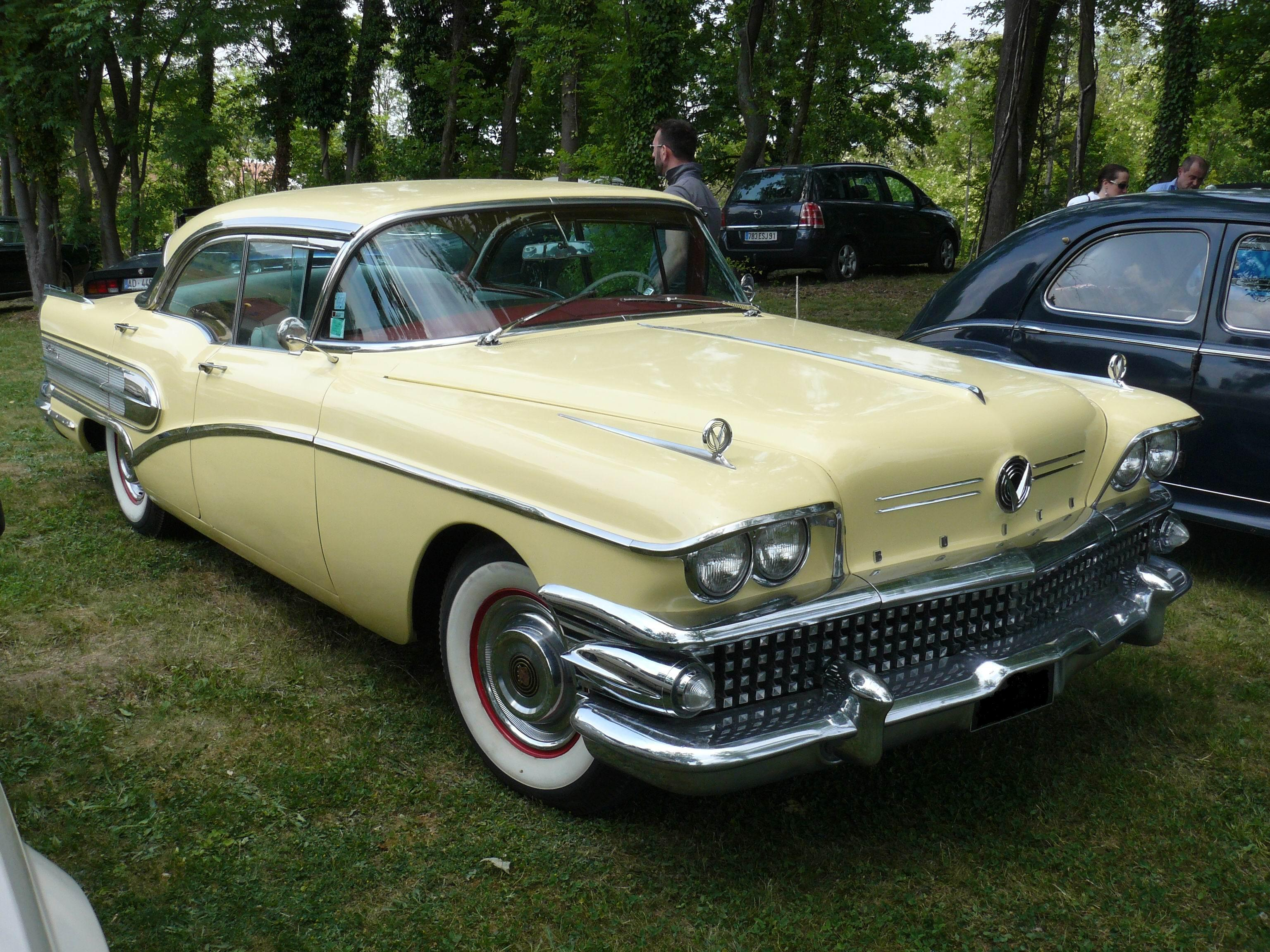 Jardinerie Laplace Mai 11'